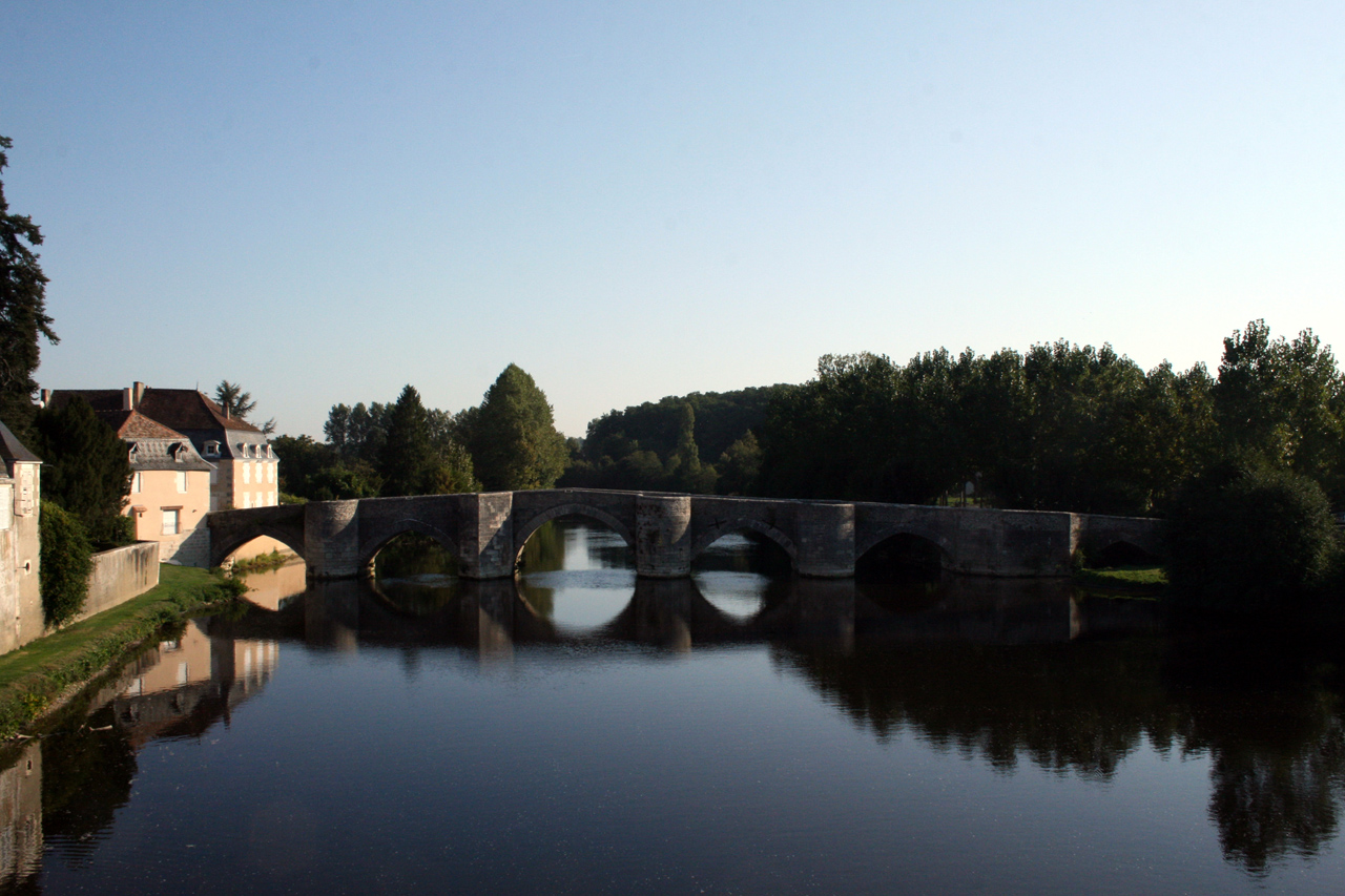 Pont sur la Gartempe entre Saint-Germain et Saint-Savin